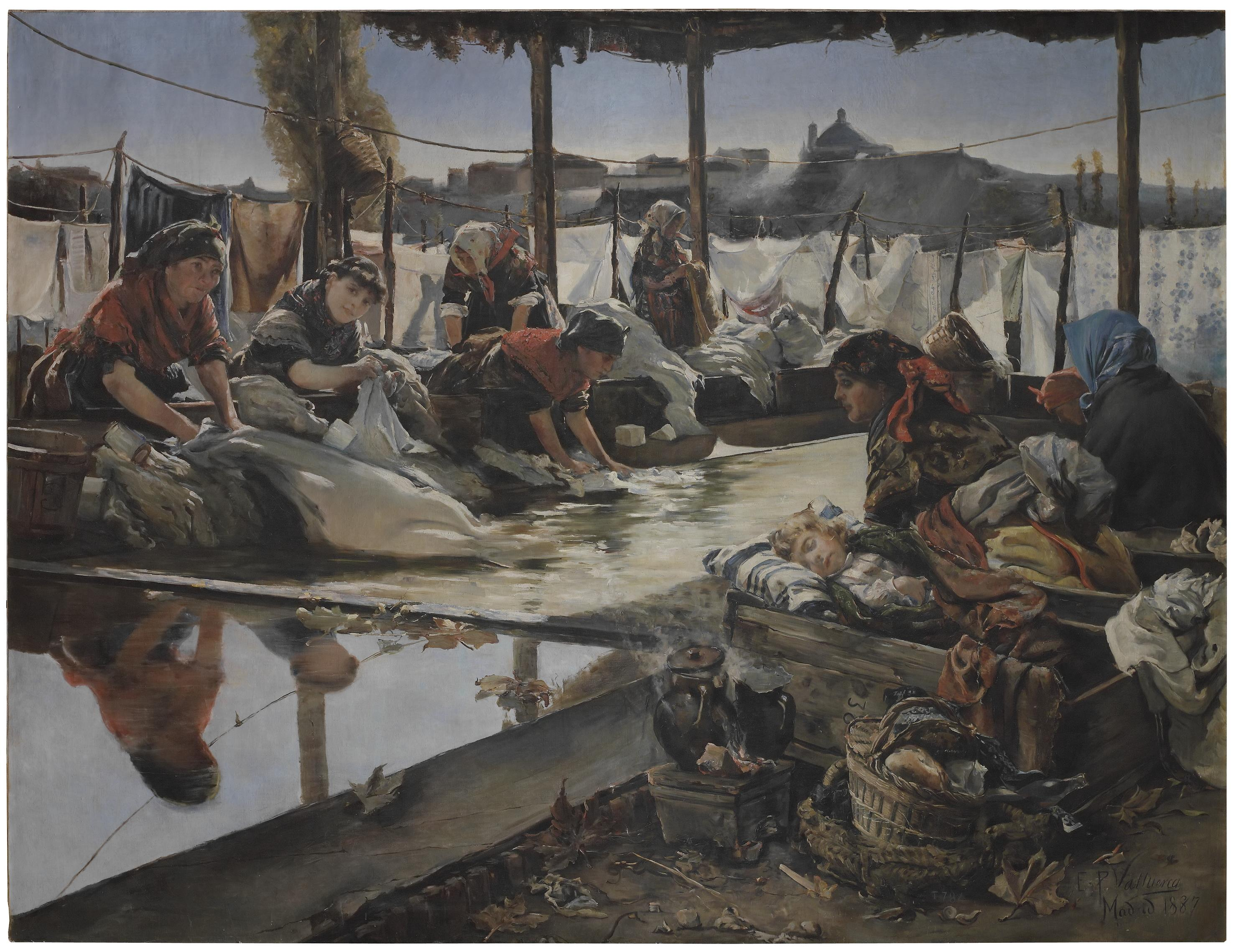 Lavanderas en el Manzanares. Óleo sobre lienzo